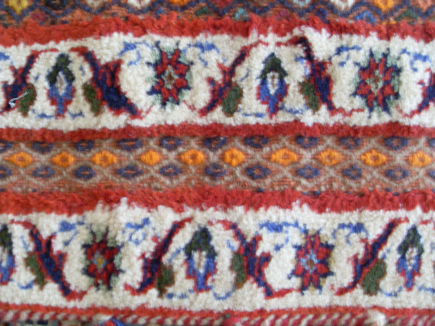 حاشیه یک فرش دستباف